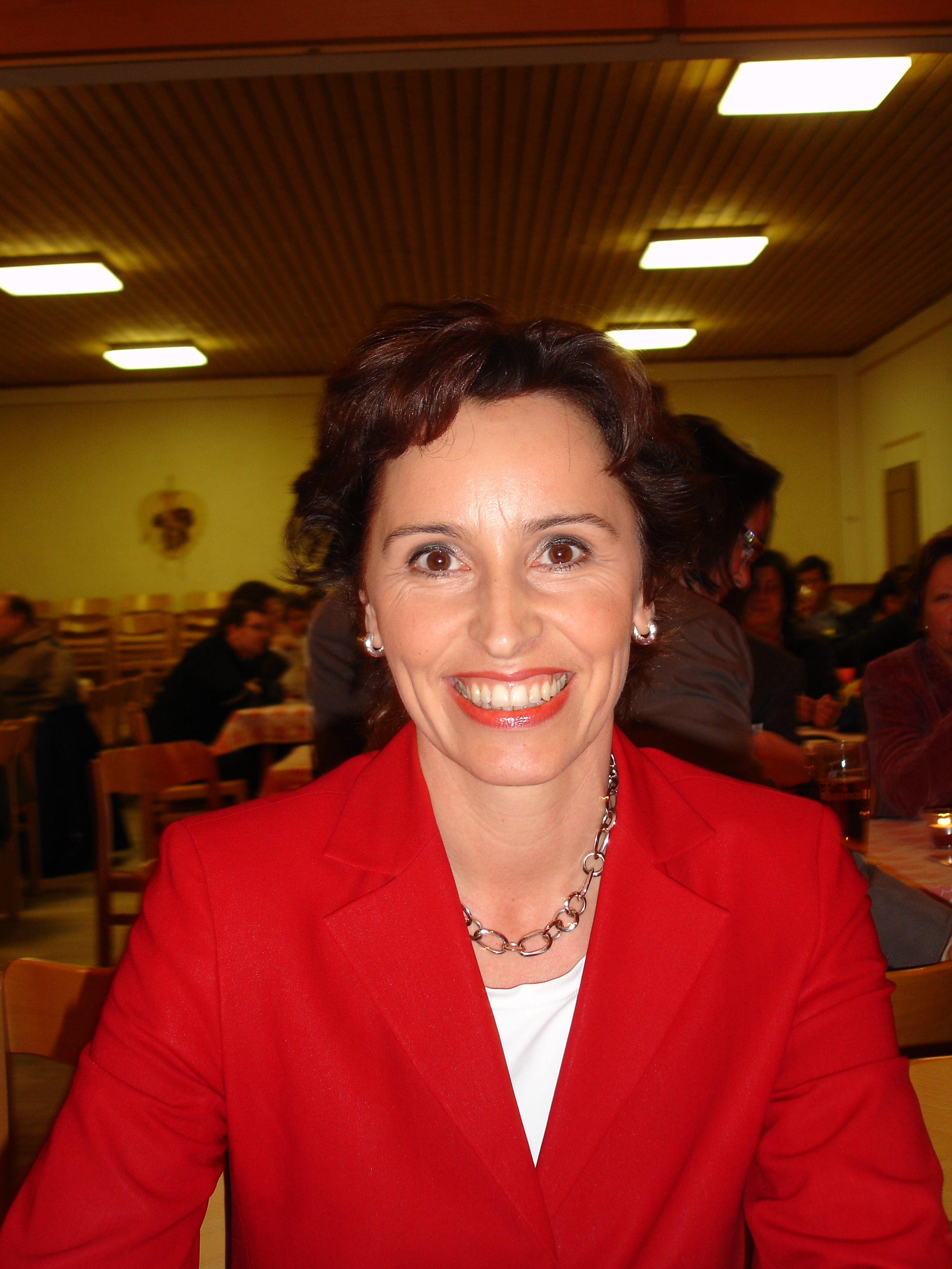 Christine Haderthauer, Generalsekretärin der CSU, Bayern, Deutschland